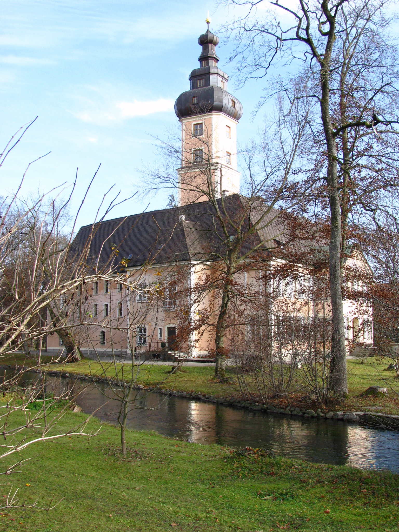 Schloss Planegg, Ansicht von Südwesten.